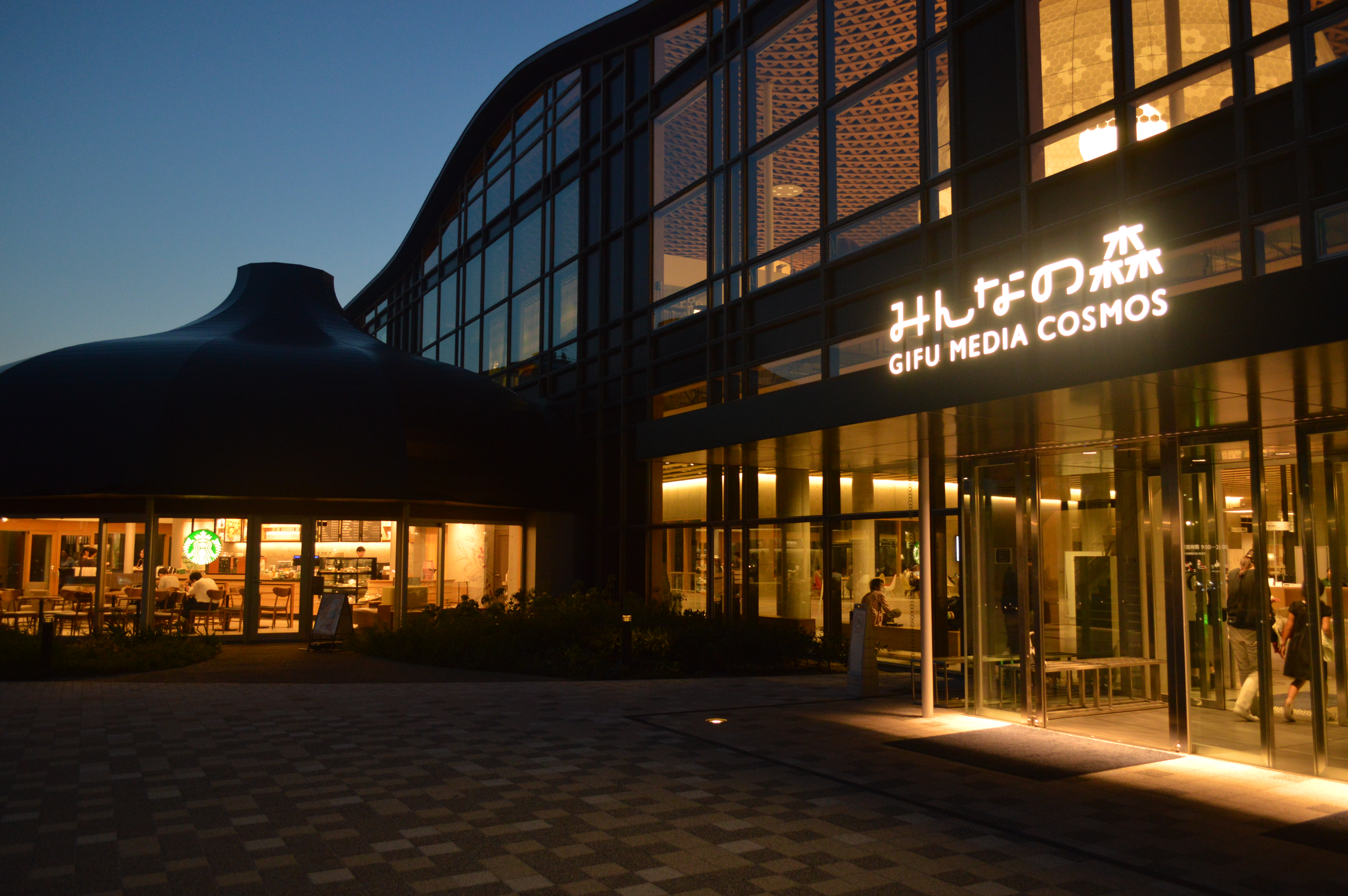 みんなの森 ぎふメディアコスモスの正面入口。左はスターバックス。